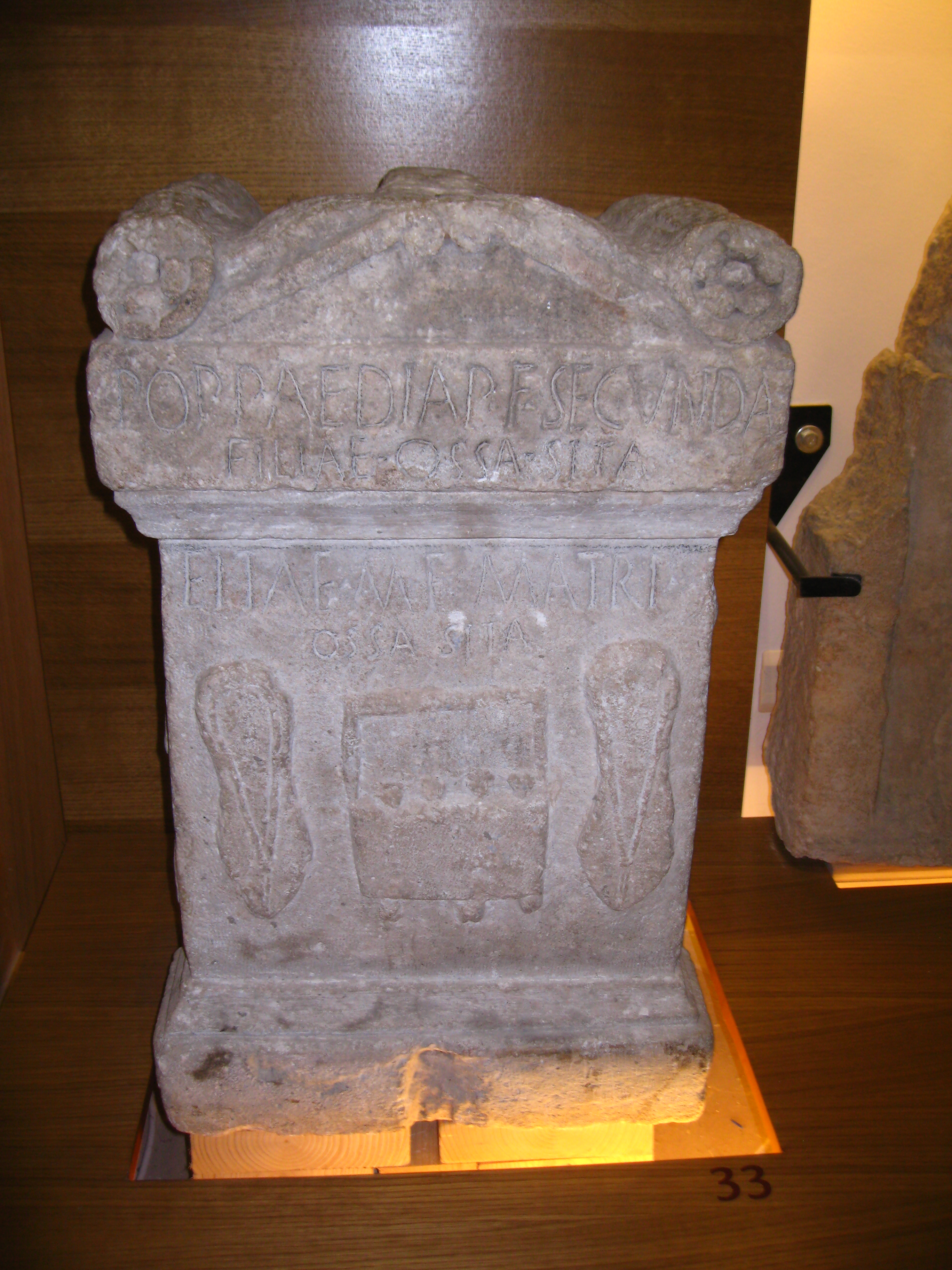 Pietra tombale di Poppedia Secunda